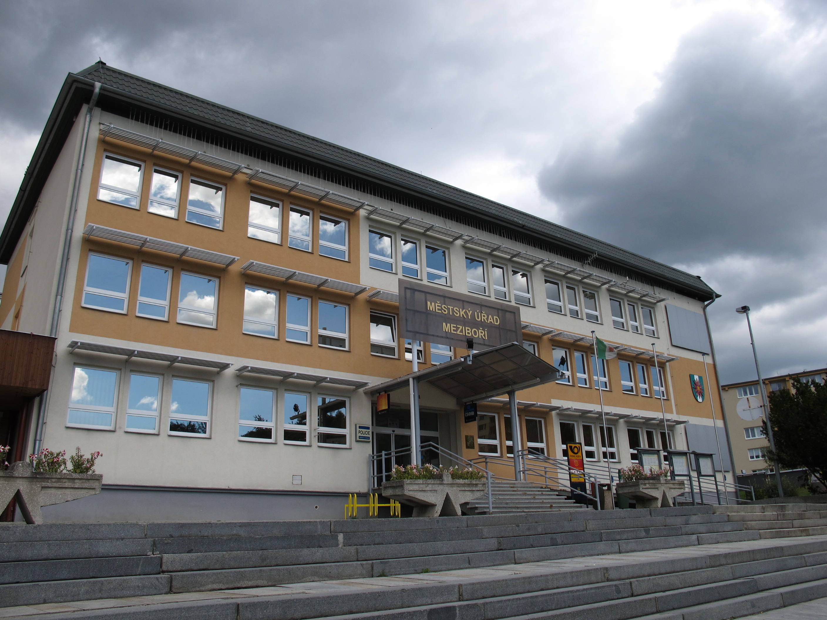 Budova Městského úřadu v Meziboří